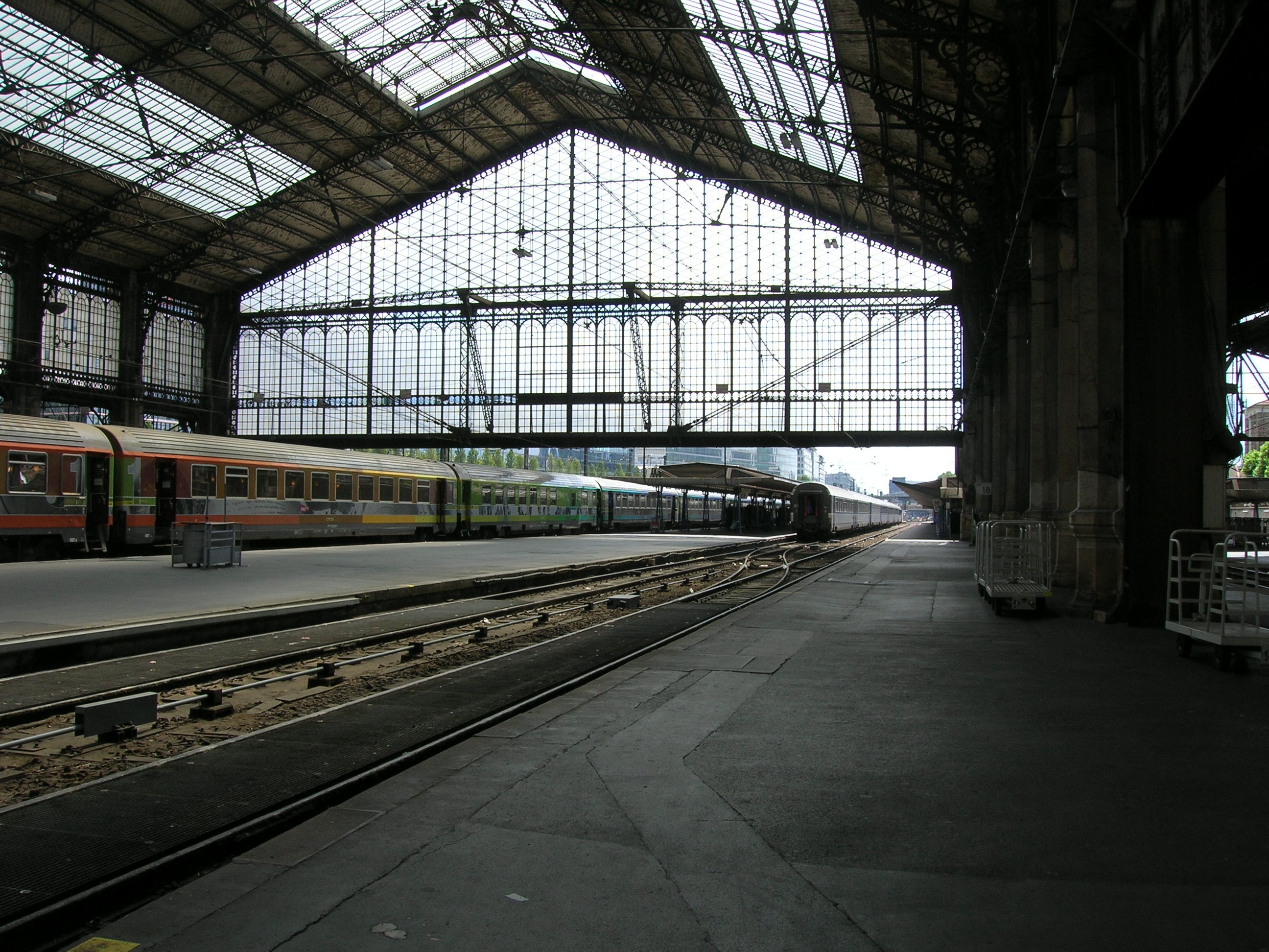 Gare d'Austerlitz, Paris, vue des voies.